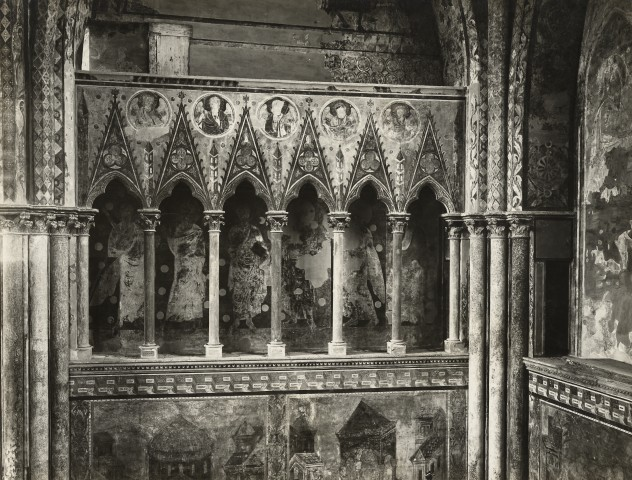 Maestro oltremontano, nicchia di sinistra